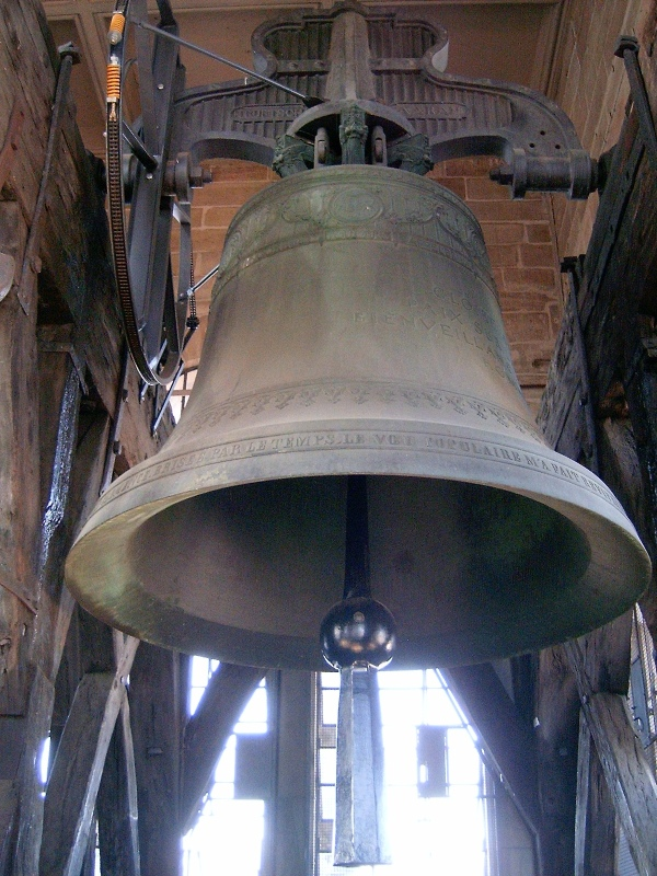 La Clémence, bourdon de la Cathédrale Saint-Pierre de Genève (Suisse). Fondue en 1902 par Rüetschi à Aarau, elle pèse 6238kg et donne le Sol2 pour un diamètre de 219cm et une hauteur de 218cm .